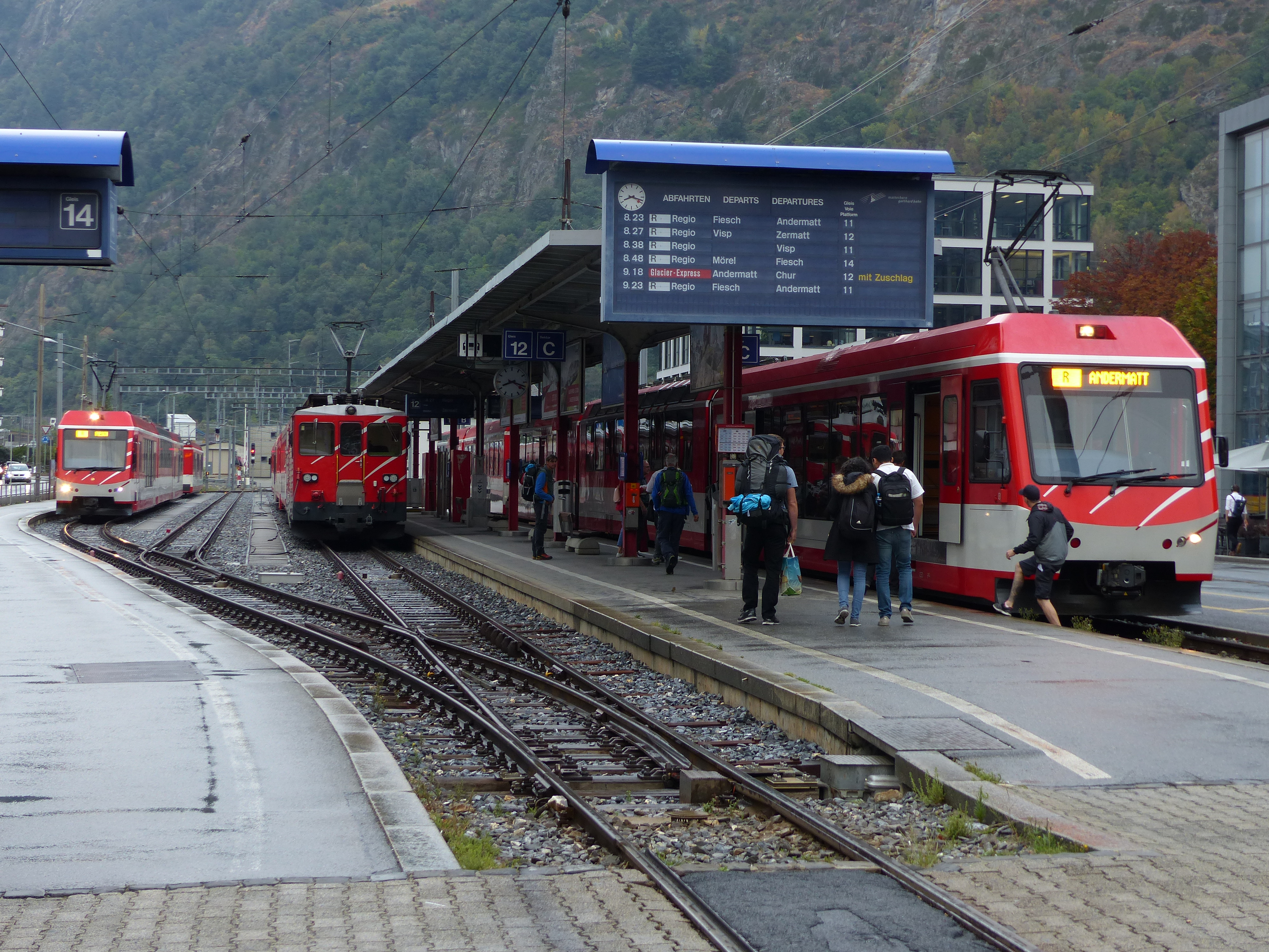 Brig Bahnhofplatz: drei Regionalzüge nach Fiesch (links), Zermatt (Mitte) und Andermatt (rechts)